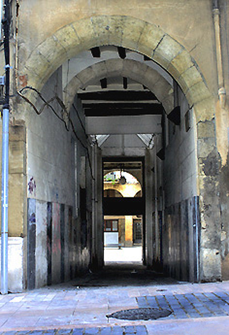 Portal dels Jueus (Reus)